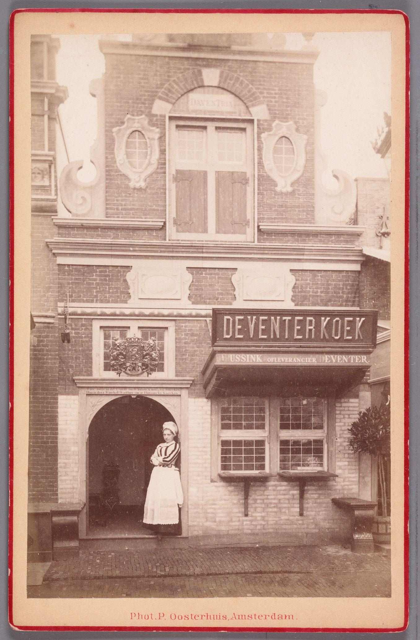 Beschrijving Voedingsmiddelen Tentoonstelling op de Museumterreinen (Museumplein), 1887 Winkel van firma Bussink, fabrikant van Deventer koeken. Volgens het opschrift op verso (in potlood) is de dame in de deuropening de toekomstige echtgenote van fotograaf Gustaaf Oosterhuis. Documenttype foto Vervaardiger Oosterhuis, Gustaaf (1858-1938) Collectie Collectie Stadsarchief Amsterdam: kabinetfoto's Datering oktober 1887 ca. Inventarissen Afbeeldingsbestand 010005000970 Generated with Dememorixer